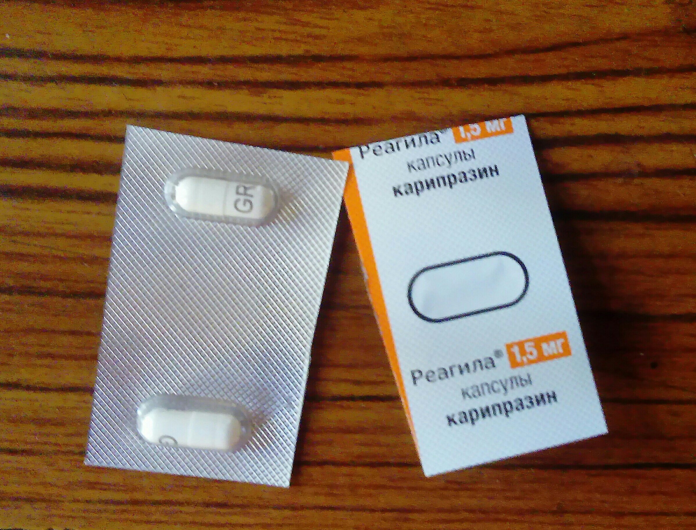 Таблетки карипразин (Реагила)